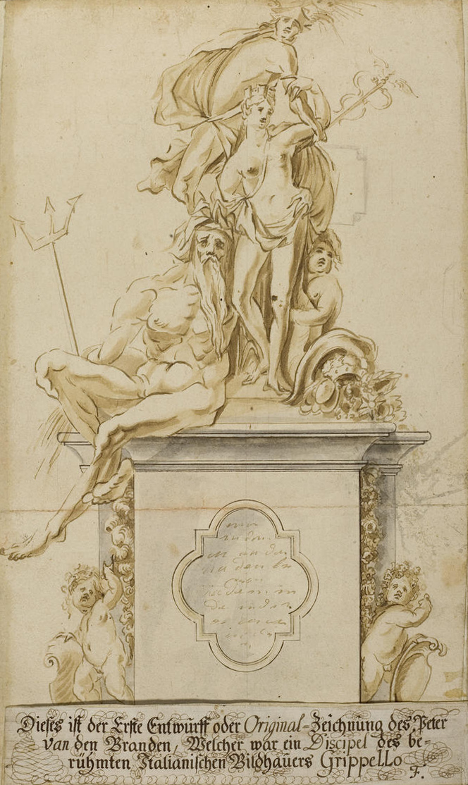 Marktplatzbrunnen vor der Umgestaltung, wie er in Heidelberg stand.